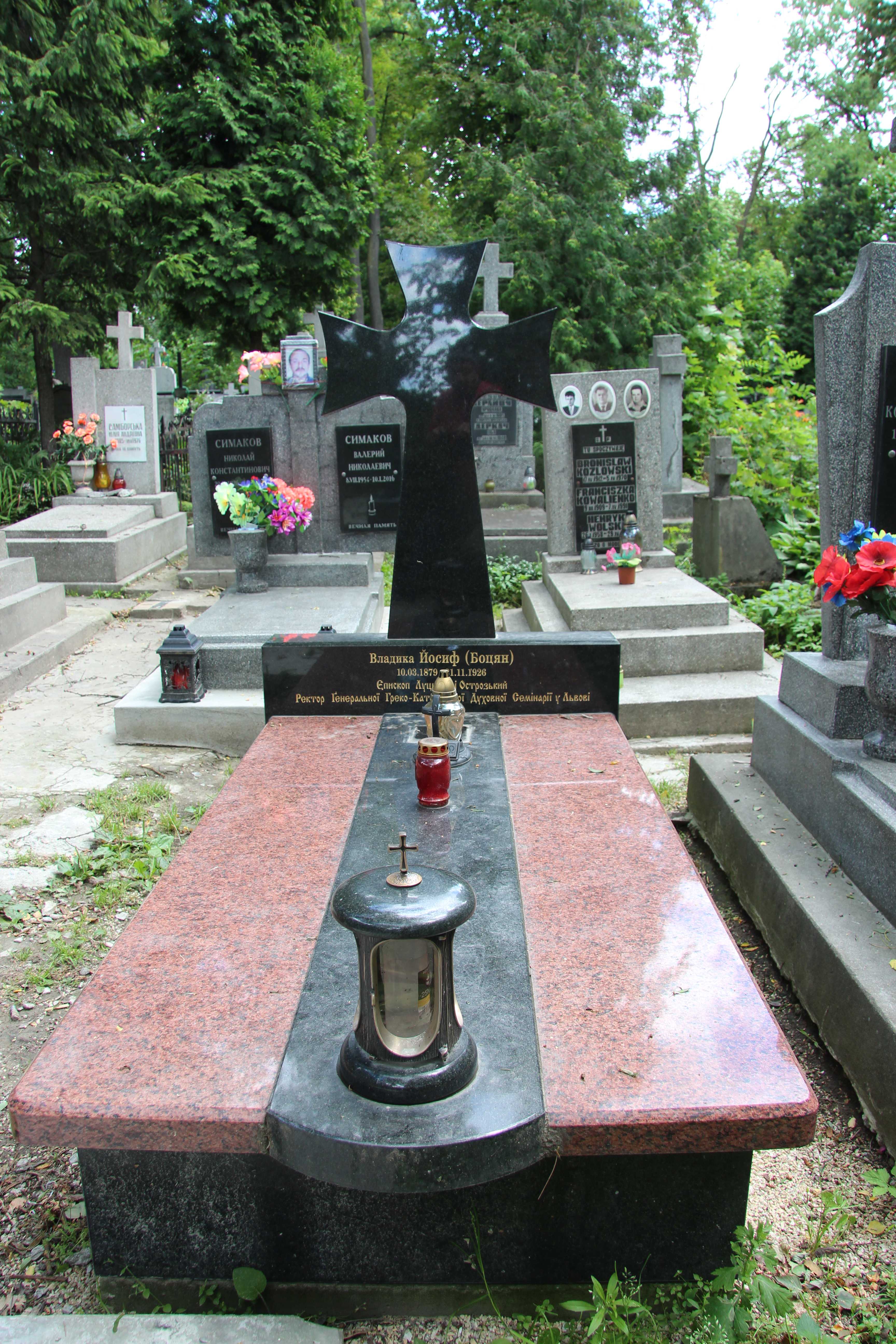 Янівський цвинтар.